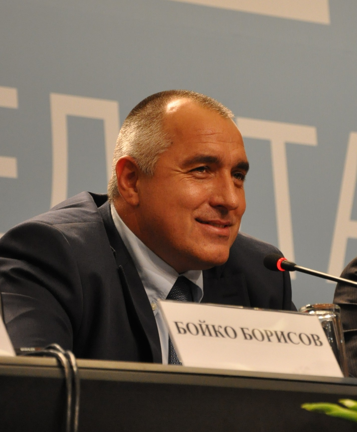 Бойко Борисов по време на пресконференция след парламентарните избори през 2009 година